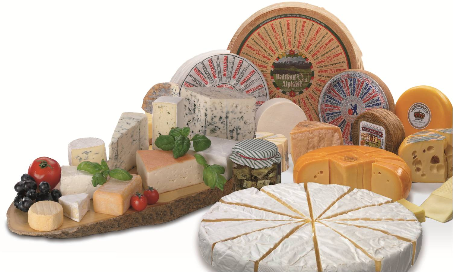 Beispiele für die ALPMA Faltverpackung